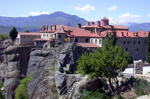 Description : Météores, monastère Saint Stéphane Date : 14 avril 2004 Auteur : Ifernyen Source : Archives personnelles Statut : GFDL Ifernyen